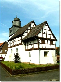 Kirche Elleringhausen